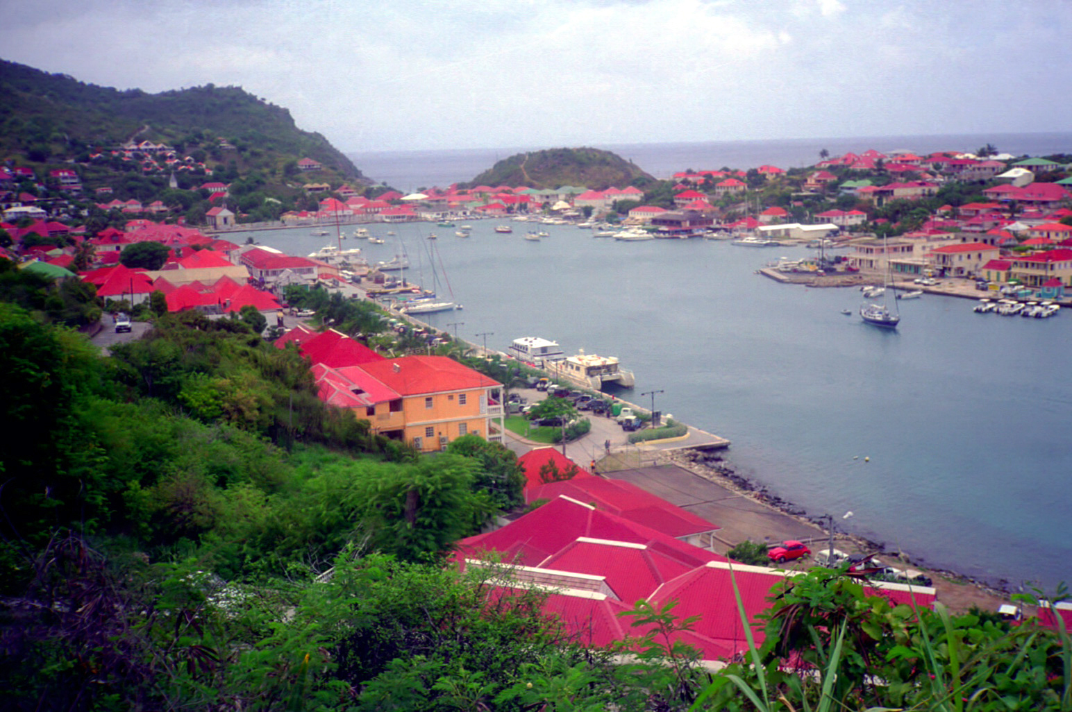 Gustavia, San Bartolomé.